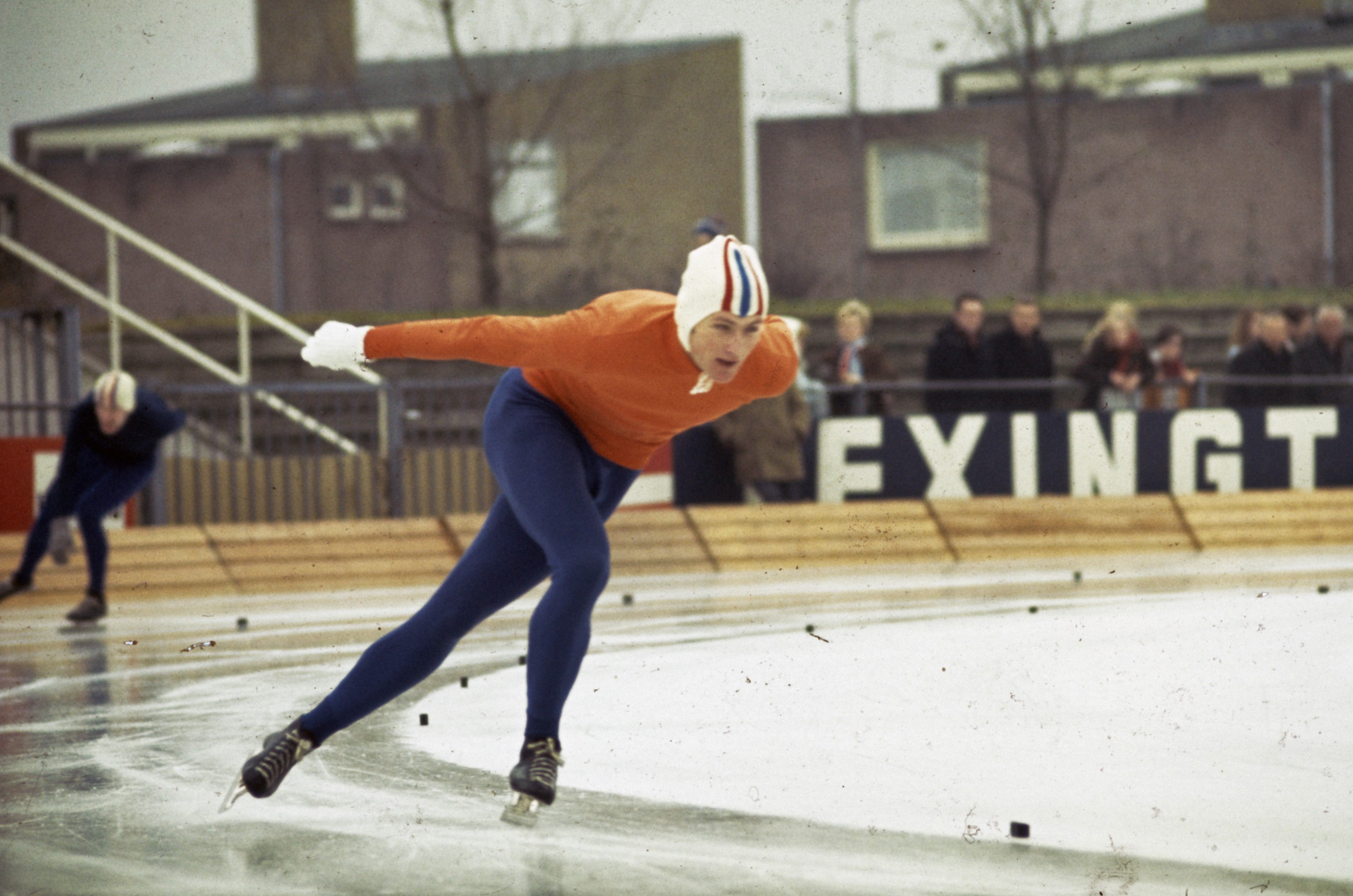 Collectie / Archief : Fotocollectie Anefo Reportage / Serie : [ onbekend ] Beschrijving : Schaatswedstrijden om de IJsselcup in Deventer. Jorrit Jorritsma in aktie. Datum : 23 november 1968 Locatie : Deventer Trefwoorden : schaatsen, sport Persoonsnaam : IJsselcup, Jorritsma Jorrit Fotograaf : Kroon, Ron / Anefo Auteursrechthebbende : Nationaal Archief Materiaalsoort : Dia (kleur) Nummer archiefinventaris : bekijk toegang 2.24.01.06 Bestanddeelnummer : 254-8238